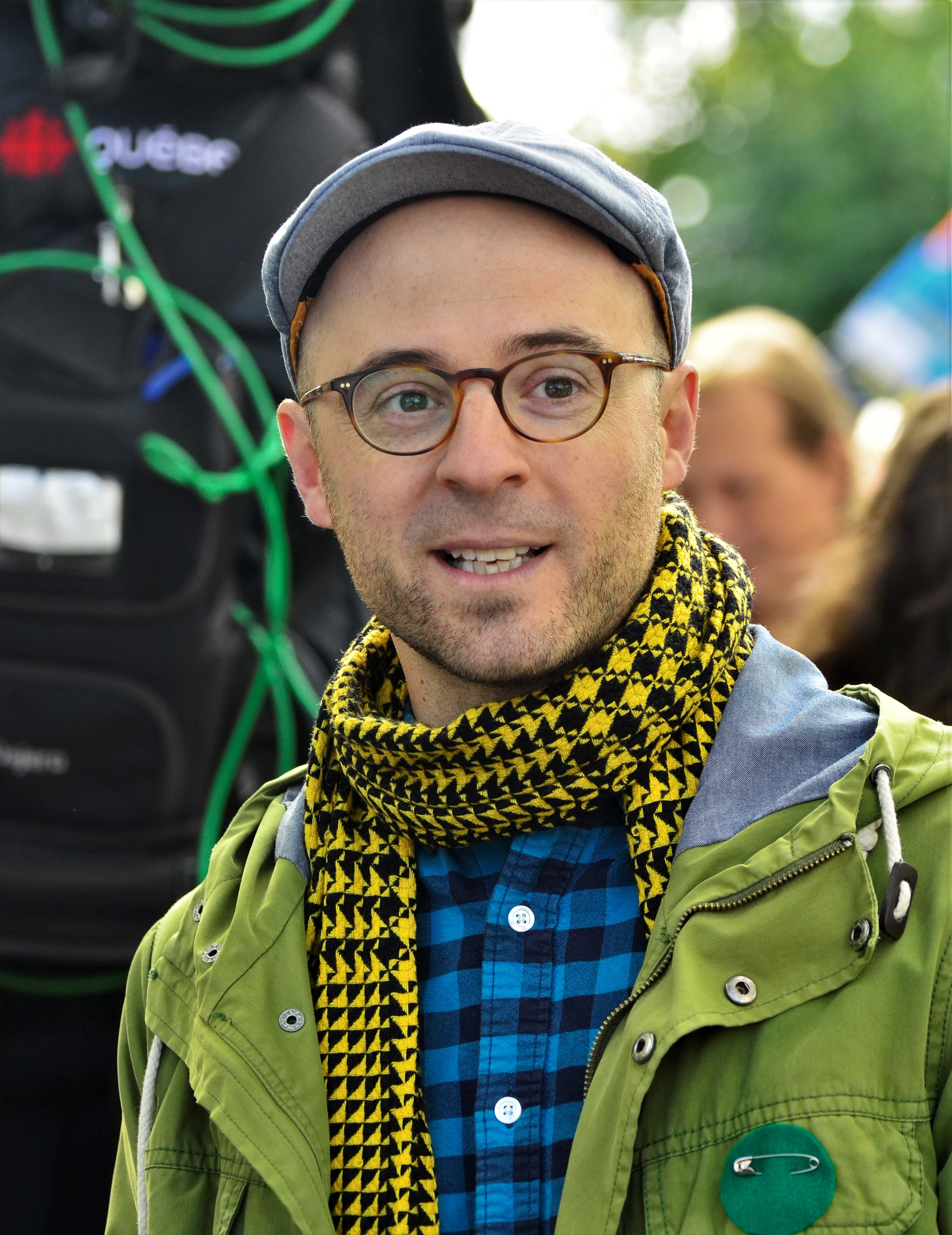 Le député de Québec solidaire à l'Assemblée nationale du Québec Sol Zanetti lors d'une entrevue donnée lors de la marche pour le climat de Québec, le 27 septembre 2019.